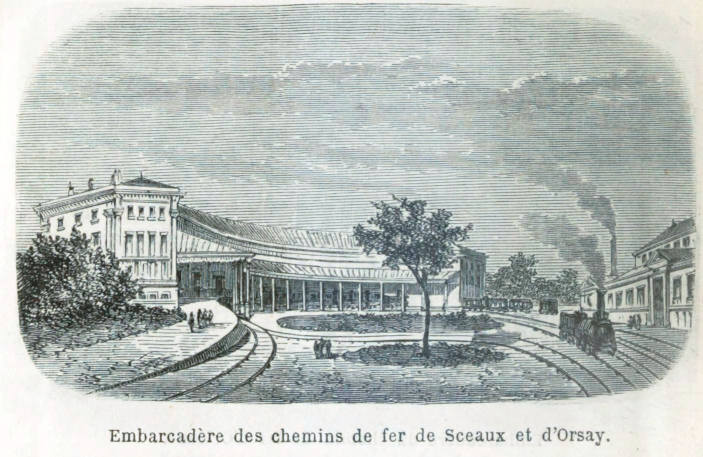 Embarcadère des chemins de fer de Sceaux et d'Orsay ([actuelle Gare de Denfert-Rochereau], gravure publiée dans Paris illustré : Guide de l'étranger et du Parisien, 1876, par Adolphe Joanne. Cette gravure figurait déjà dans l'édition 1870 du même ouvrage, et antérieurement dans: A. Laurent Joanne : Les environs de Paris illustrés, itinéraire descriptif et historique, Hachette, Paris, 1856, p. 719 avec, au bas de l'image les inscriptions THEROND à gauche et TRICHON à droite (en ligne).